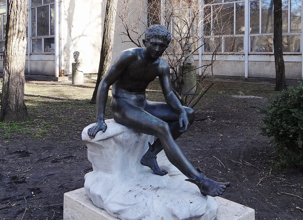 Pihenő Hermész (Ülő Merkúr) szobor - másolat; Epreskert